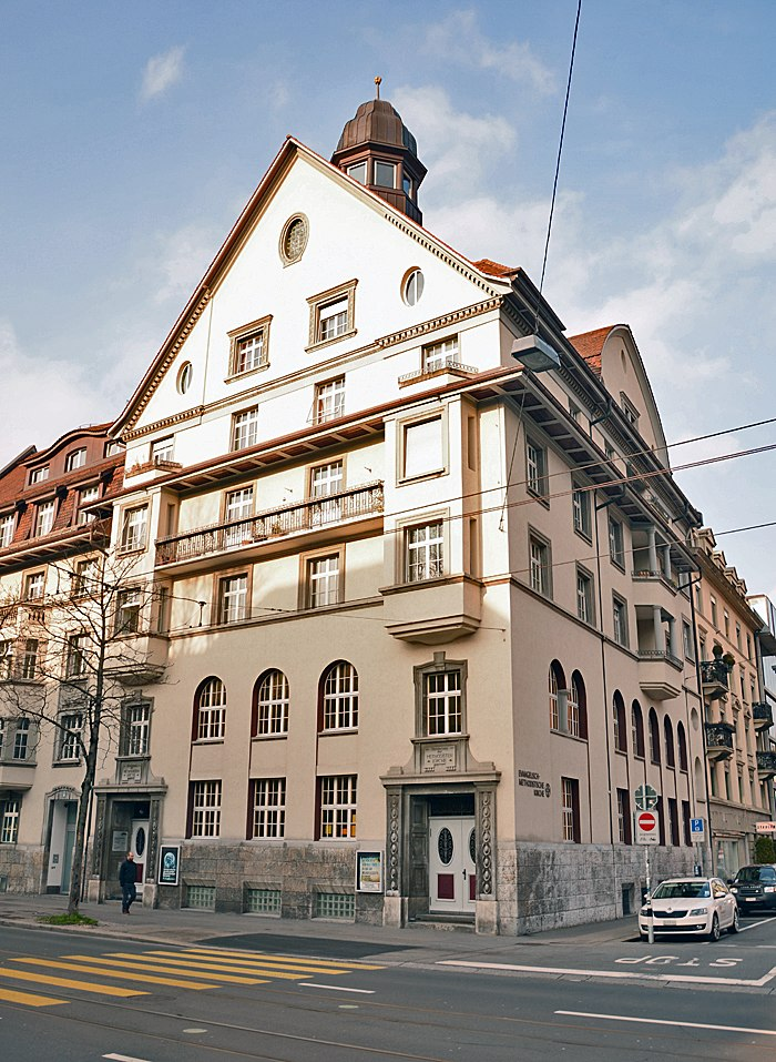 Evangelisch-methodistische Kirche, Zürich, Stauffacherstrasse Ecke Rotwandstrasse